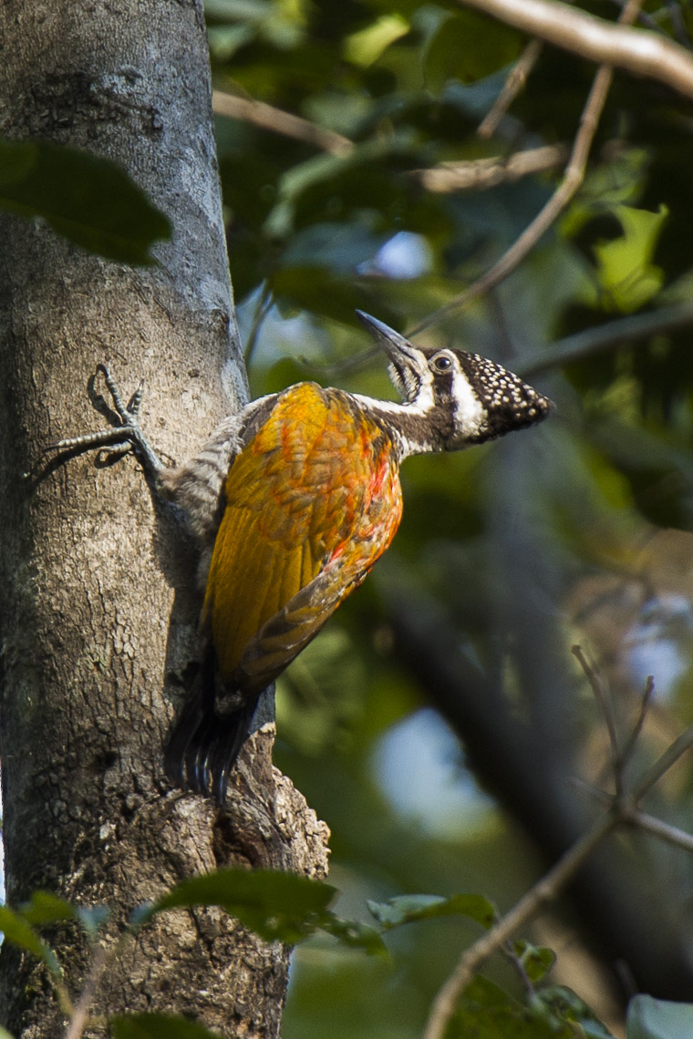 Greater Flameback - Corbett NP_1618